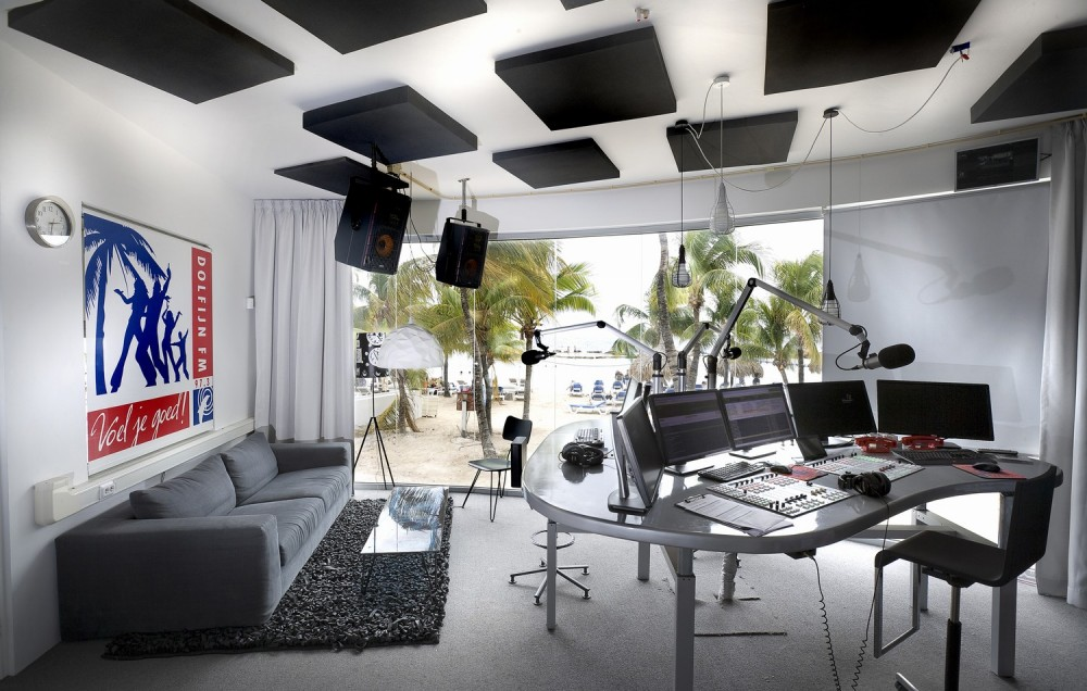 De radiostudio van Dolfijn FM aan het Curaçaose strand van Seaquarium Beach ligt op een steenworp afstand van zee.